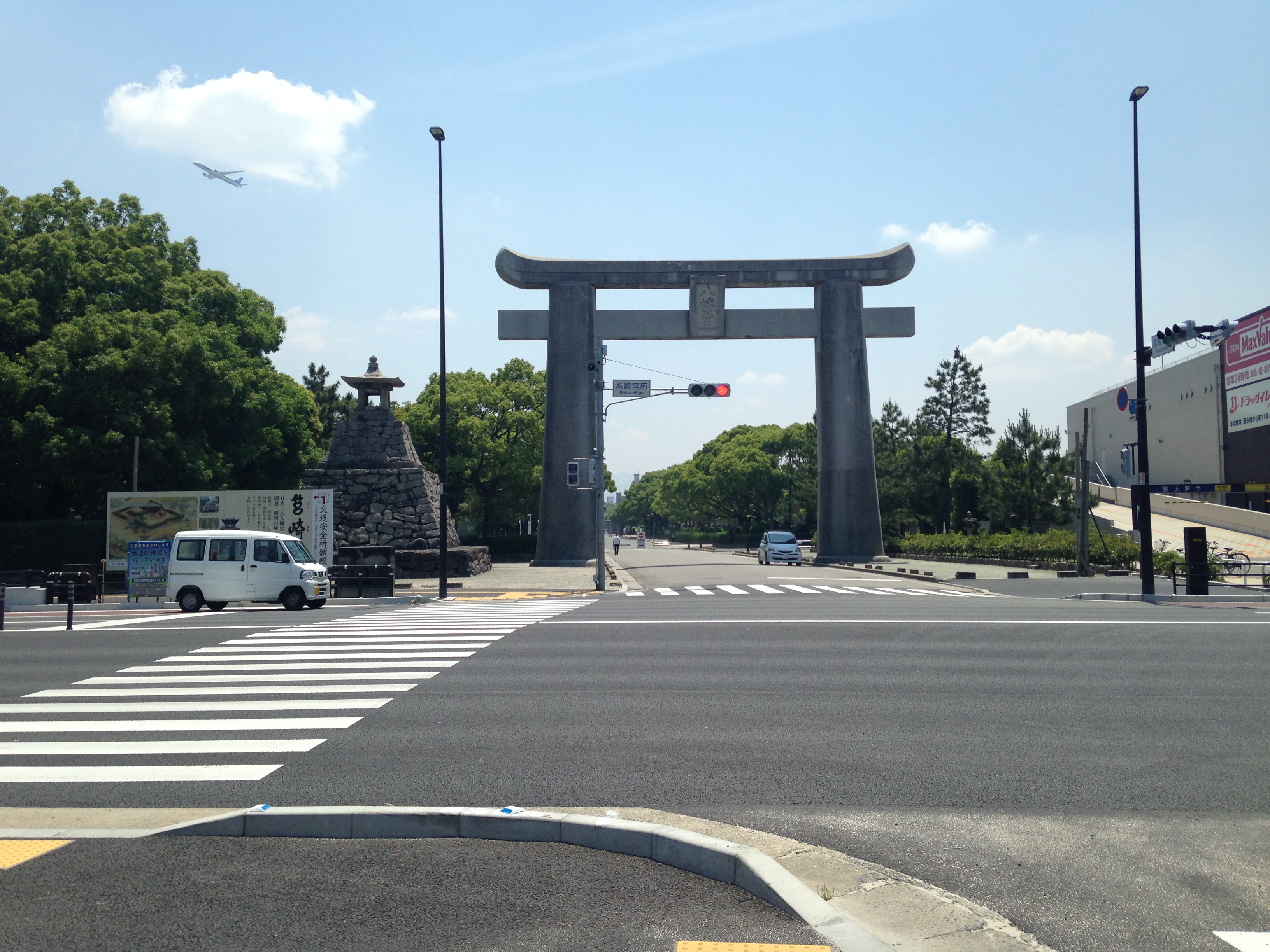 国道3号の側にある筥崎宮の大鳥居